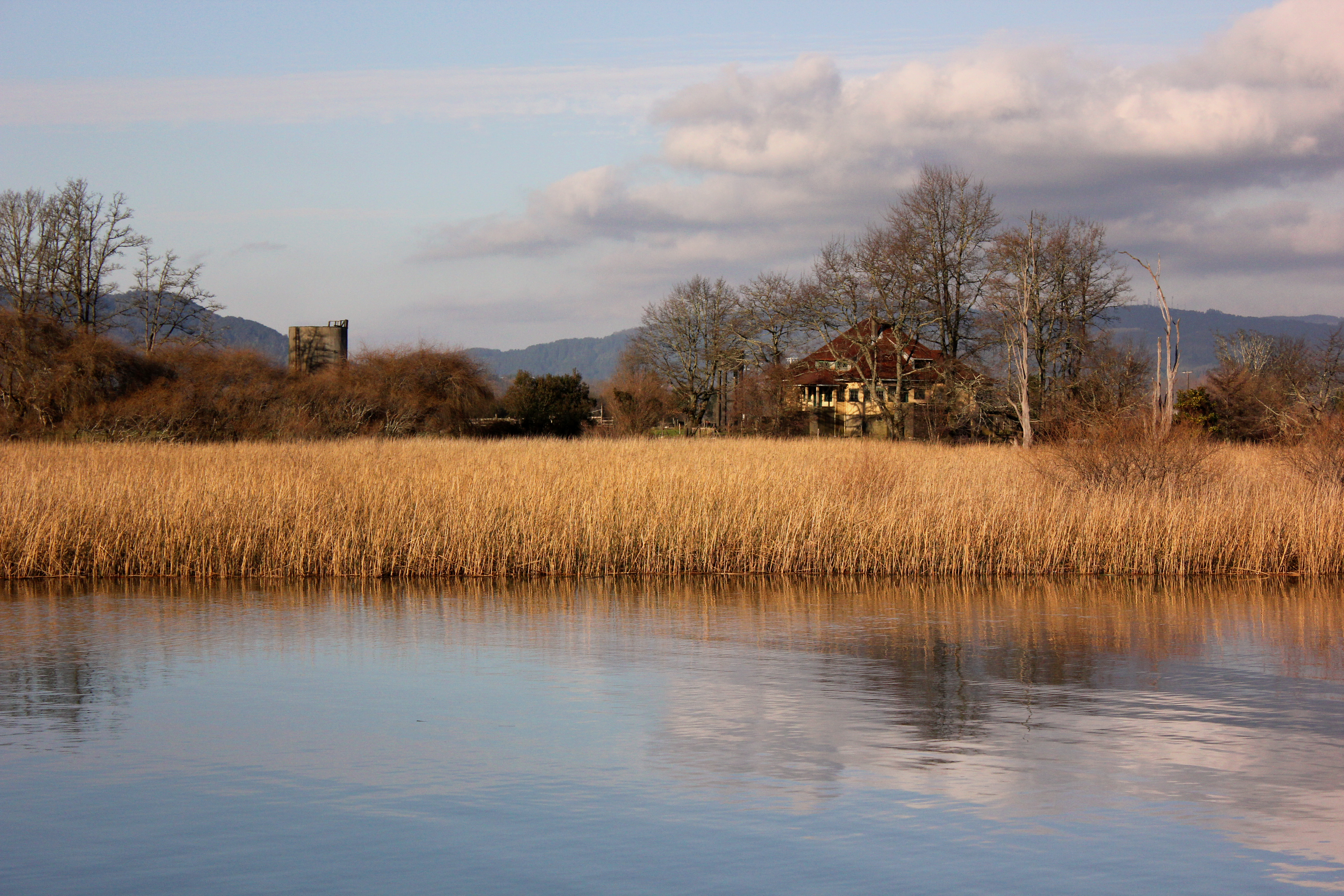 Humedales de los ríos Cruces y Chorocomayo This is a photo of a national monument in Chile: 163